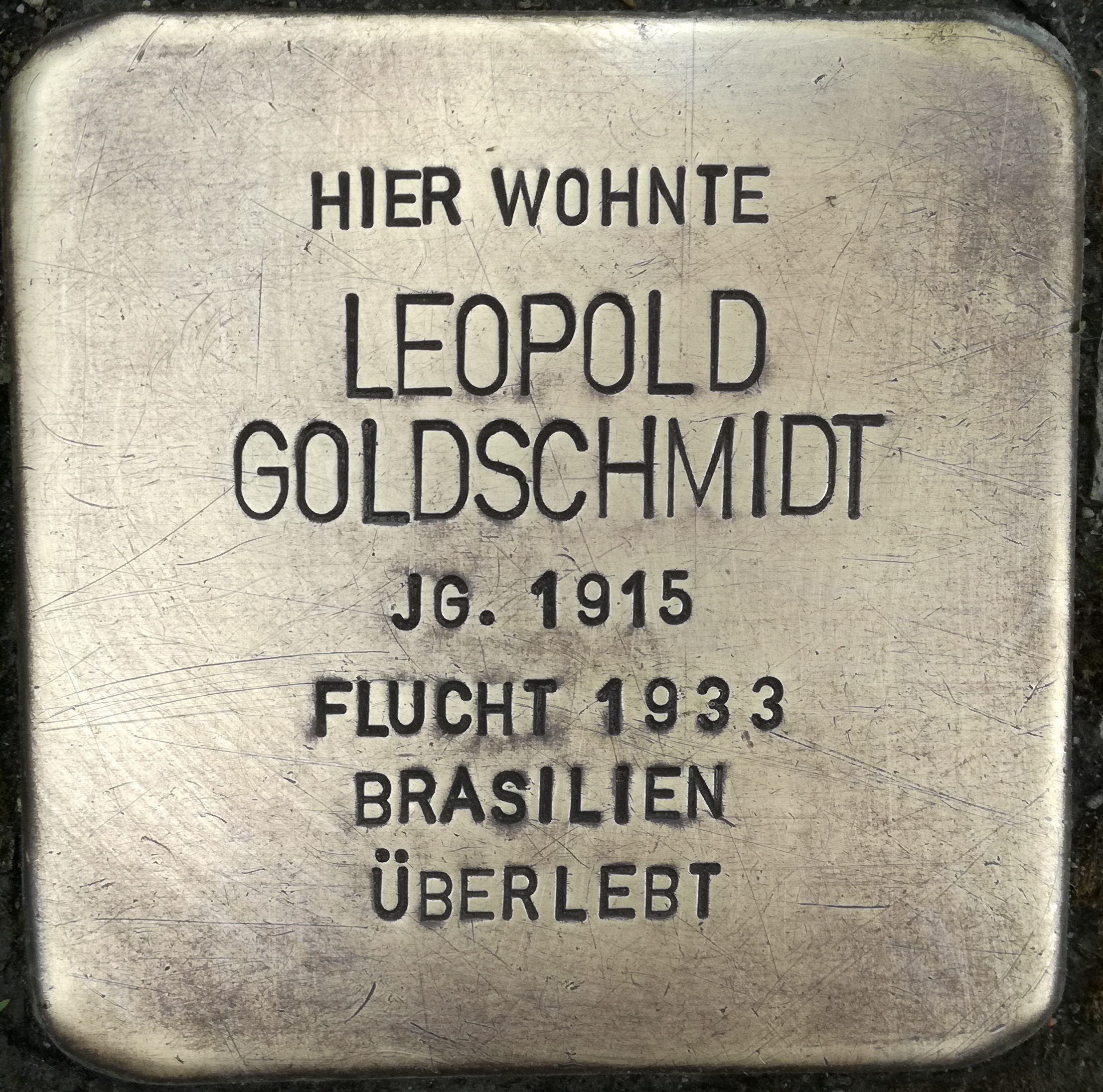 Hier wohnte Leopold Goldschmidt Jahrgang 1915 Flucht 1933 Brasilien überlebt